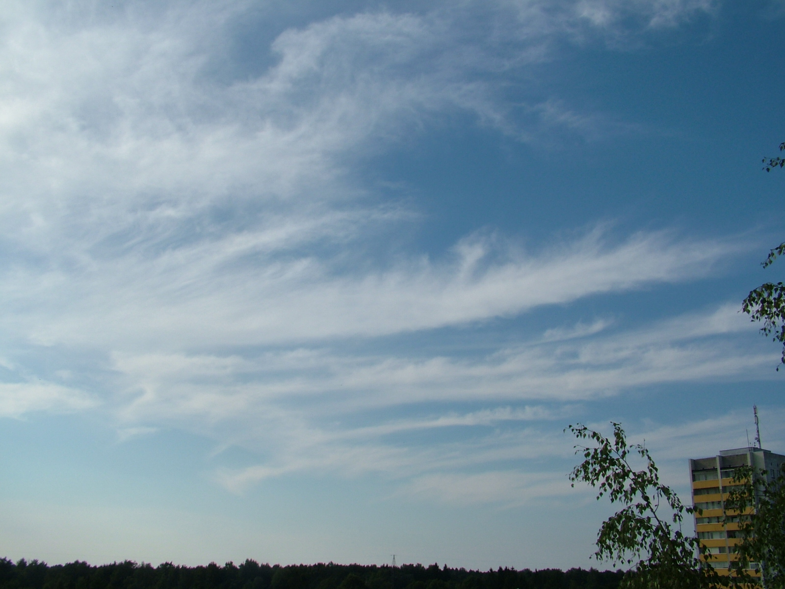 Kiudpilved 2.8.2010 Tallinna kohal